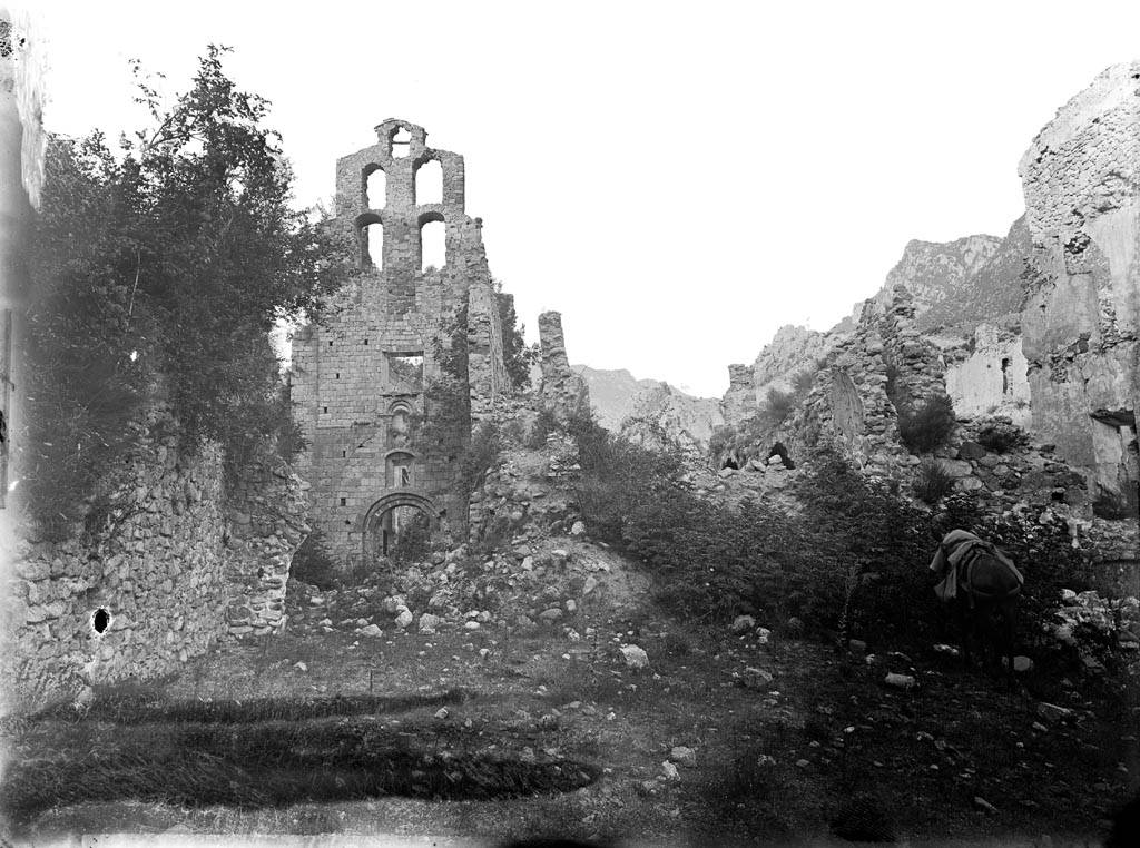 Imatge